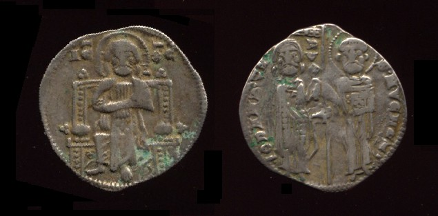 Matapan di Venezia di Giovanni Dandolo (1280) Al dritto San Marco che consegna la bandiera al doge. Al rovescio Cristo seduto